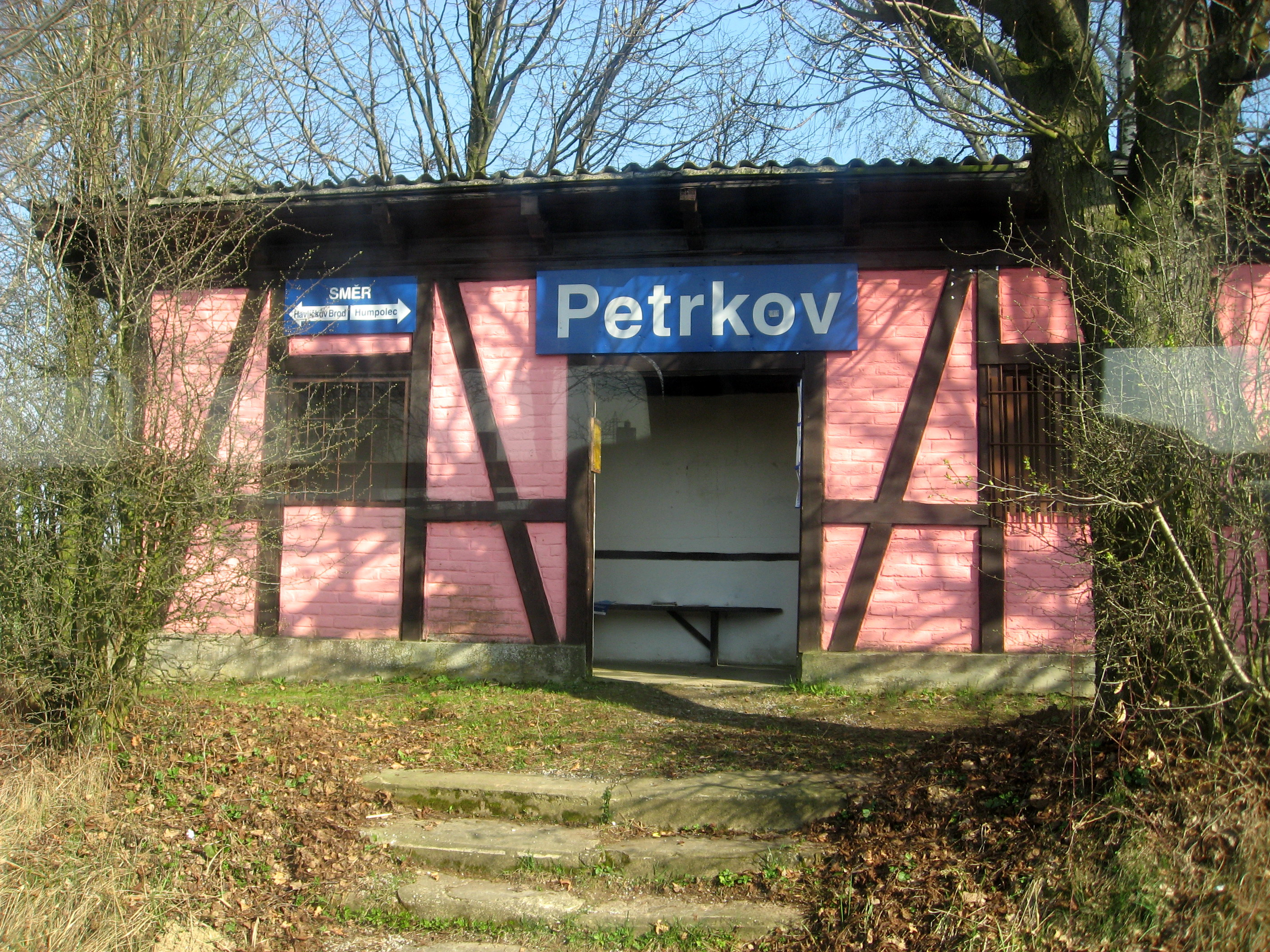 Petrkov, železniční stanice